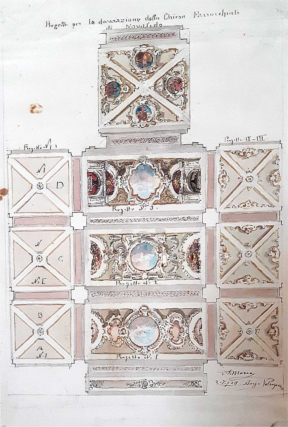 affresco della navata e delle cappelle laterali realizzato nella chiesa di Sant'Agostino di Novaledo